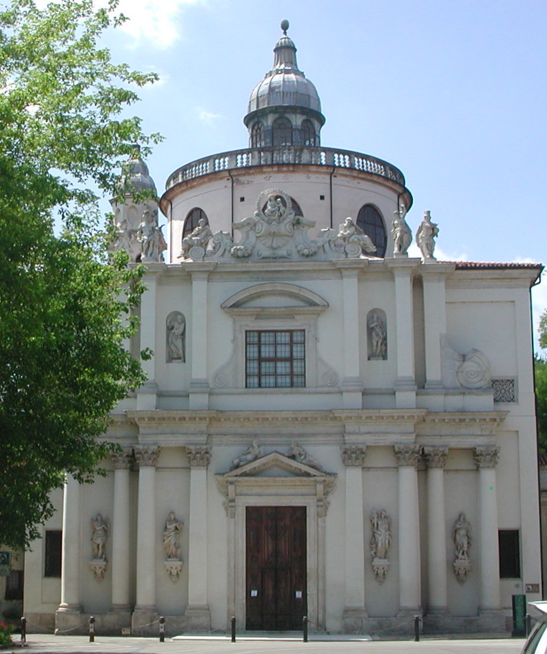 Facciata della chiesa di Santa Maria in Araceli a Vicenza.